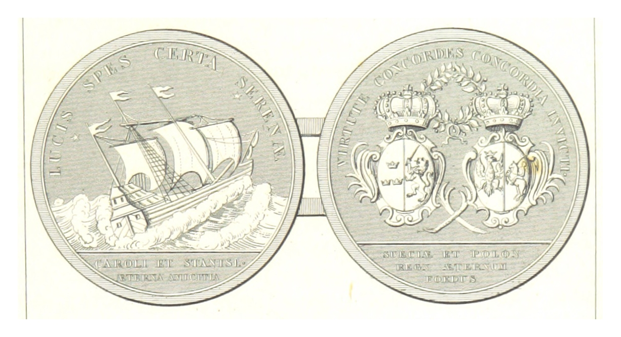 Médailles frappées à l'occasion de la conclusion de la paix d'Altranstädt, en 1706.